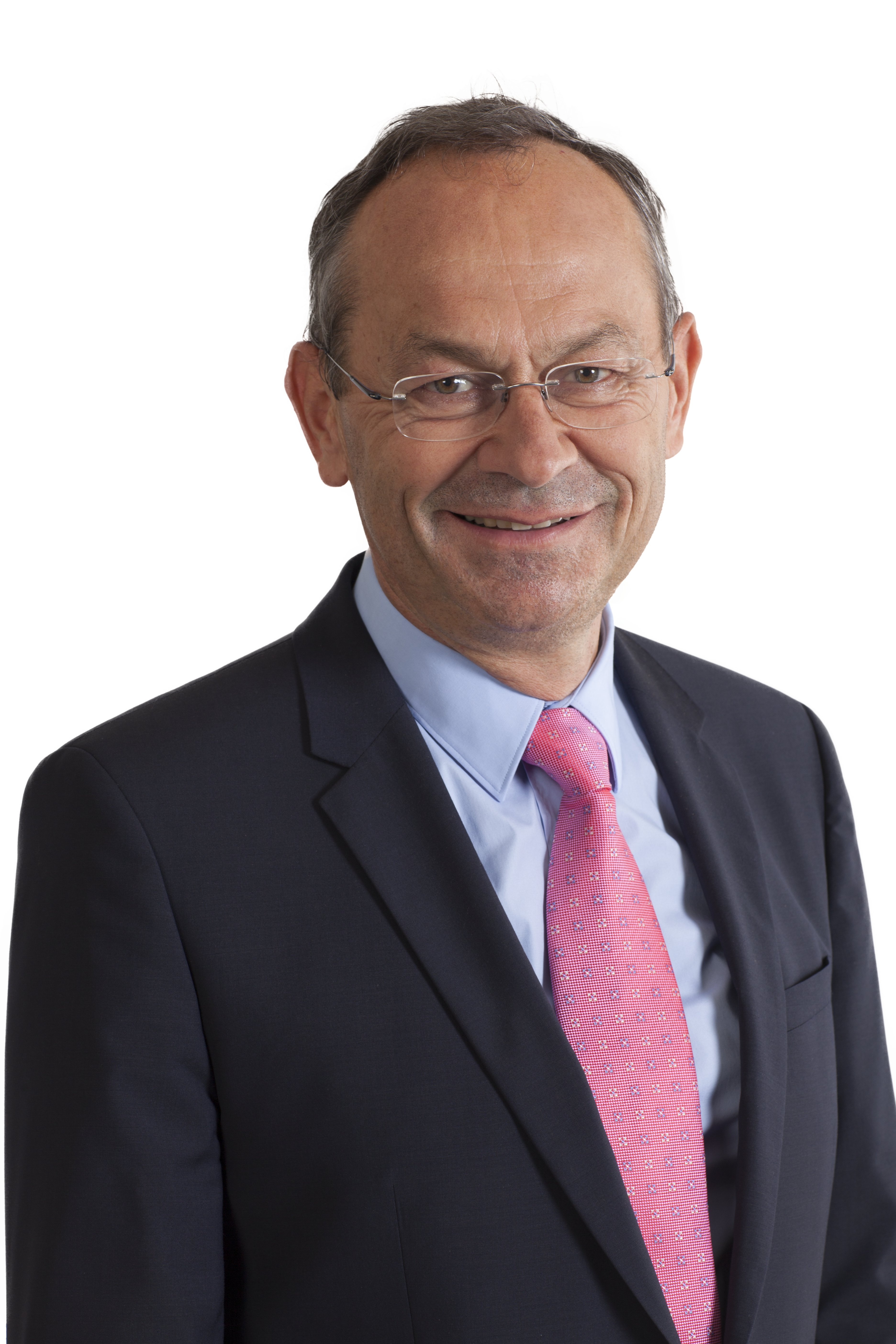 Olivier Français - candidat au Conseil des Etats 2015